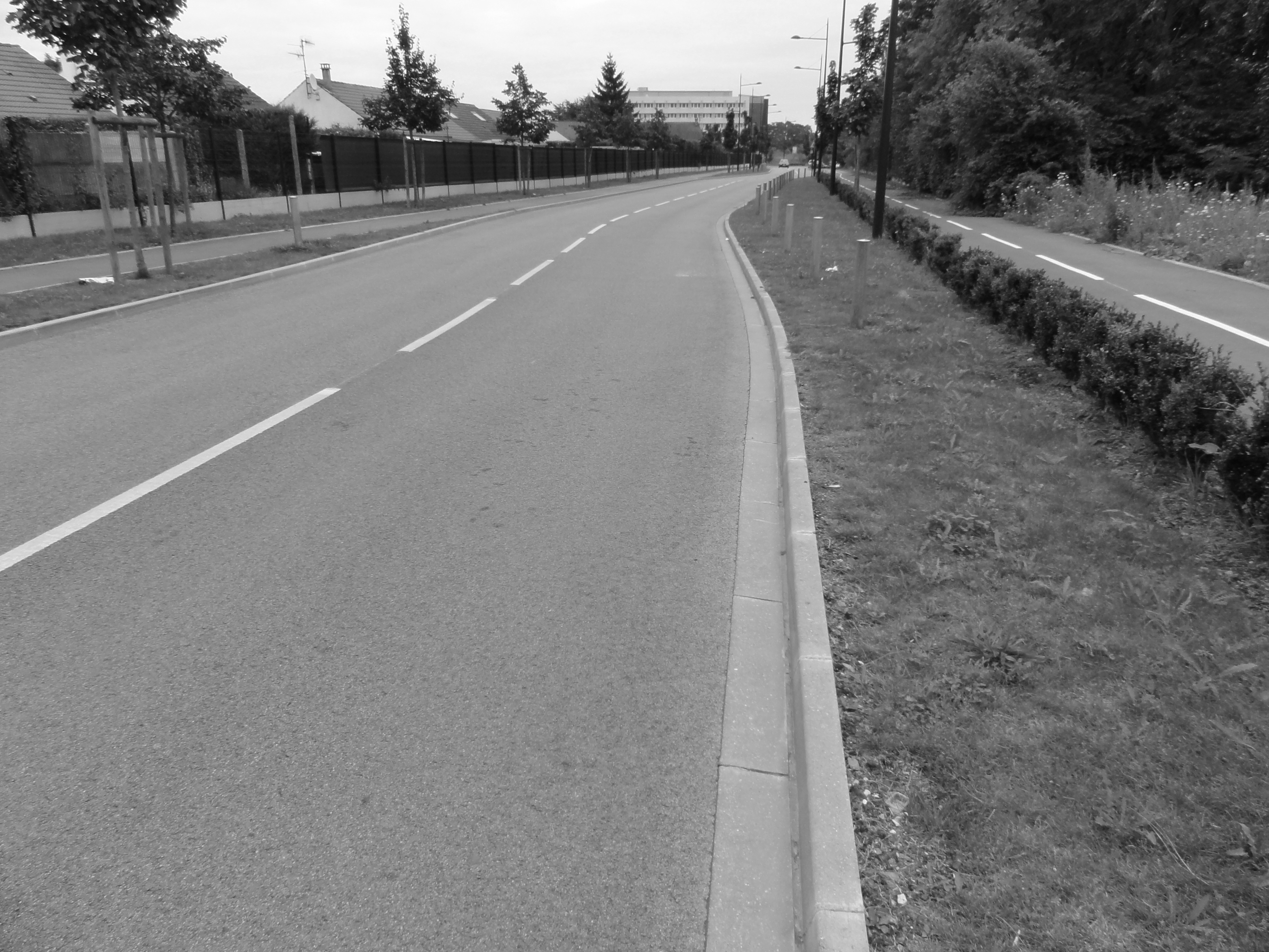 Terril n° 233 dit Cavalier du 3 de Lens, disparu, Fosse n° 3 - 3 bis de la Compagnie des mines de Lens, Liévin, Pas-de-Calais, Nord-Pas-de-Calais, France.